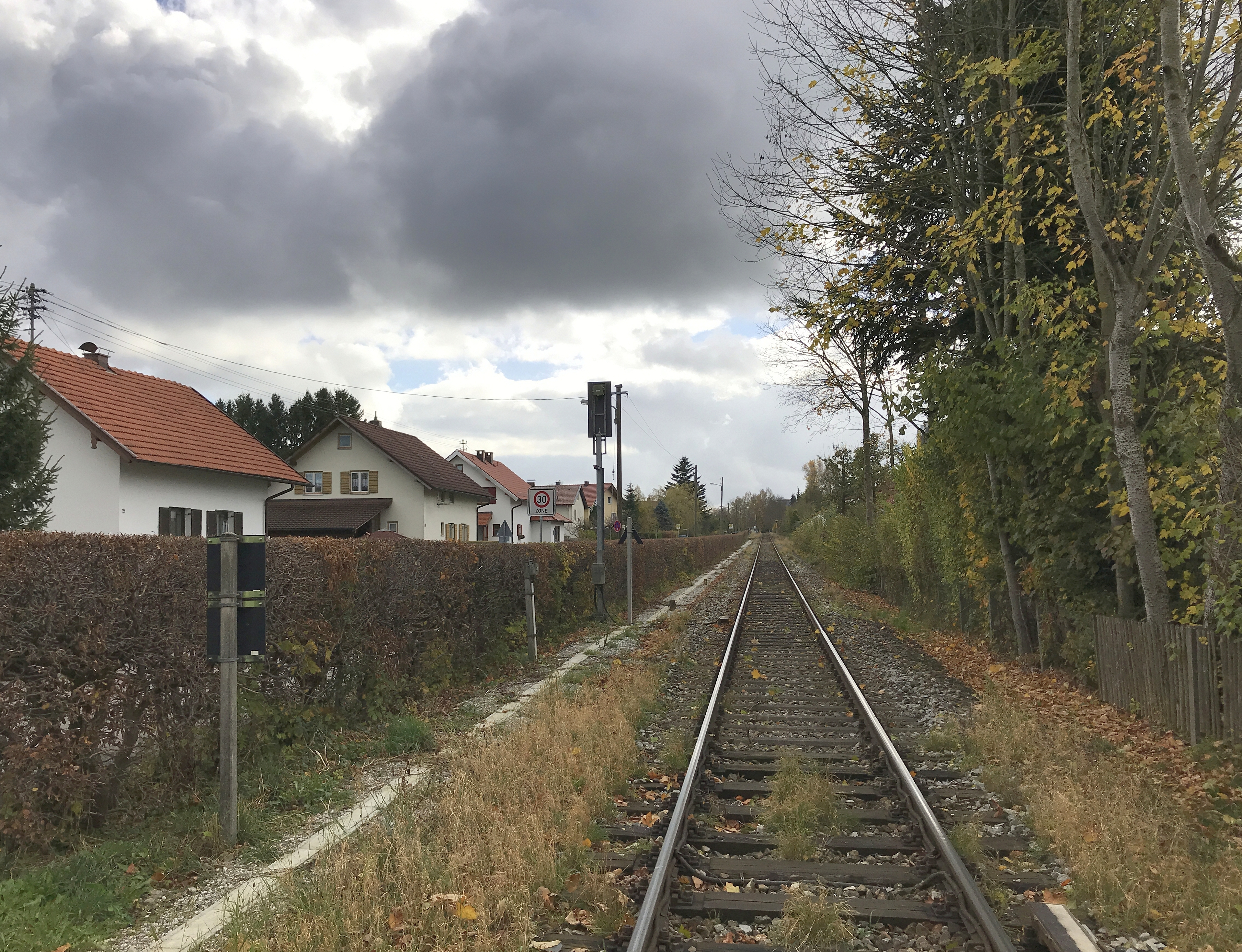 Bahnstrecke Weilheim–Schongau südlich des Haltepunkts Peiting-Nord, Oktober 2017